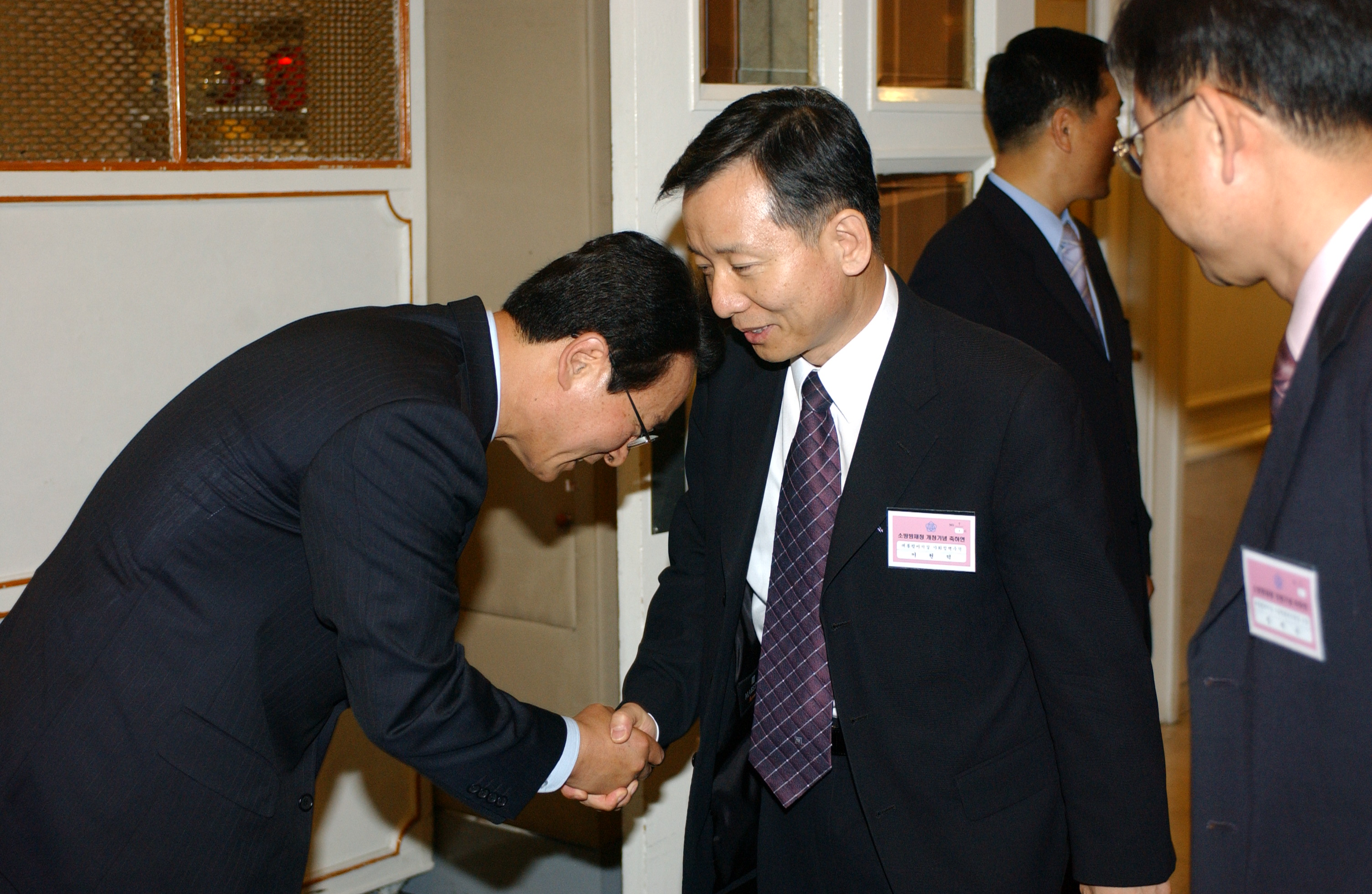 2004년 6월 서울특별시 종로구 정부종합청사 초대 권욱 소방방재청장 취임식에서 사회정책수석비서관 이원덕이 권욱과 악수하고 있다.